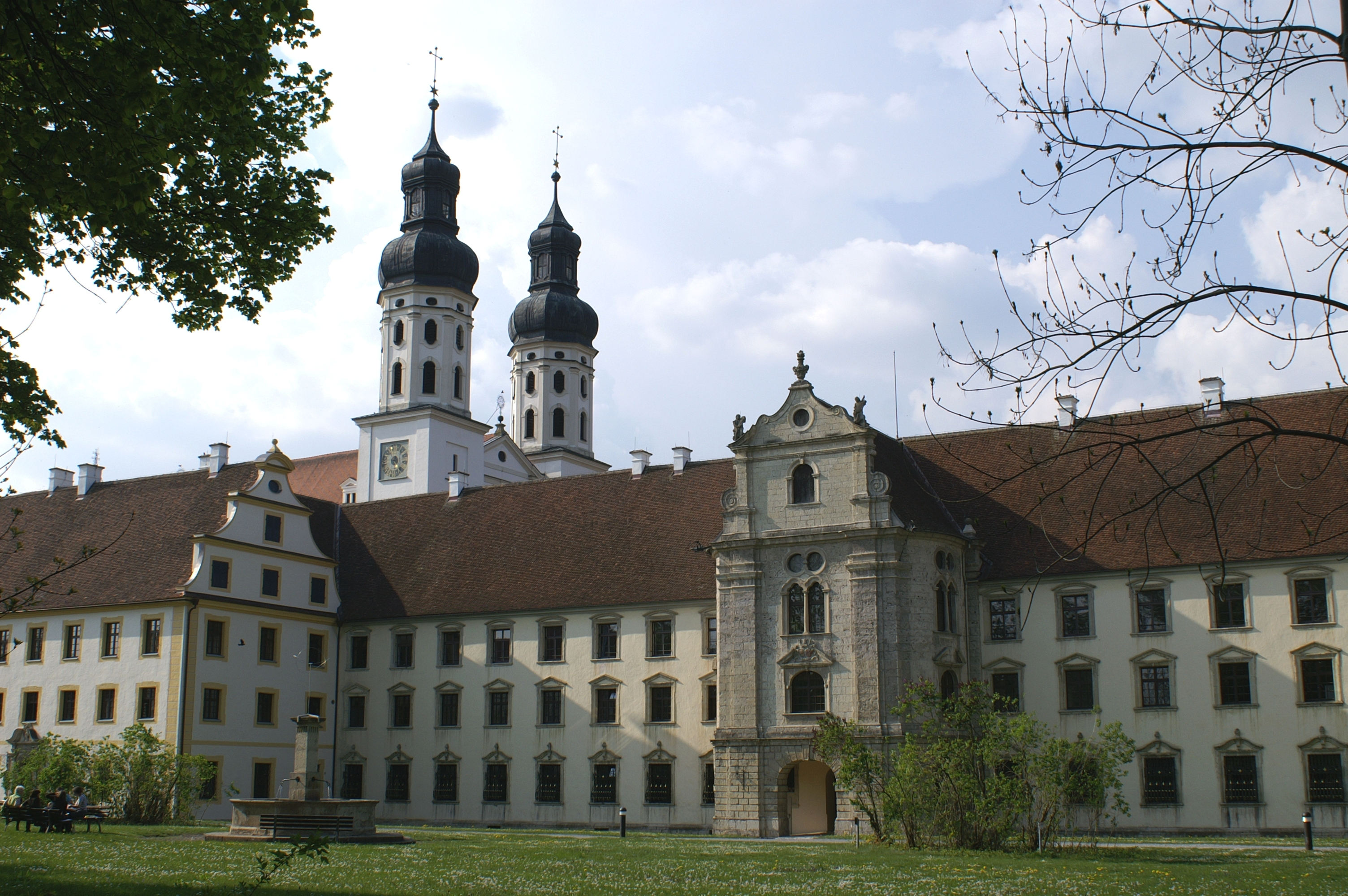 Konventgebäude im Kloster Obermarchtal. Im Hintergrund das Münster.